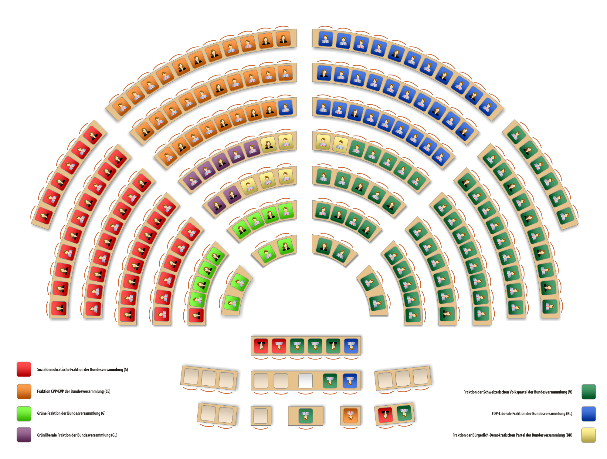 Sitzverteilung Nationalrat nach Fraktionen ab Dezember 2016